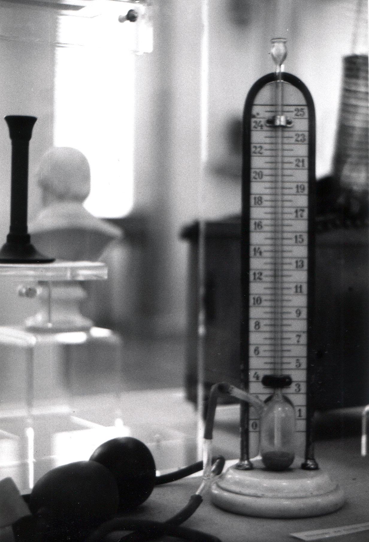 Gaertner-Tonometer zur Blutdruckmessung (ca. 1900)